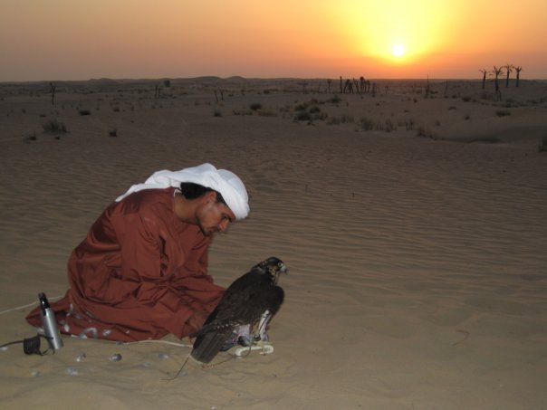 Falcon in Dubai desert